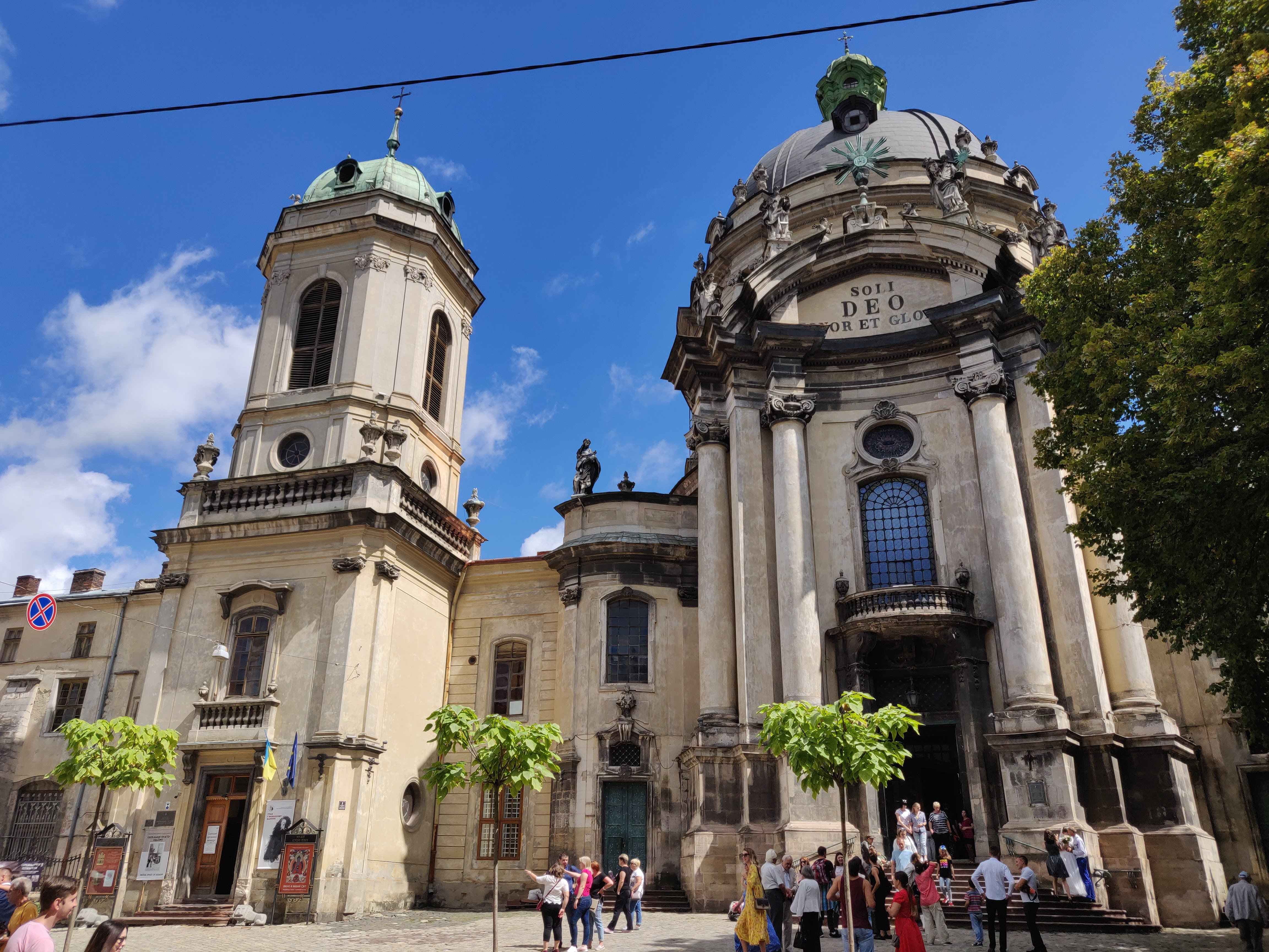 Kościół Bożego Ciała i klasztor Dominikanów we Lwowie